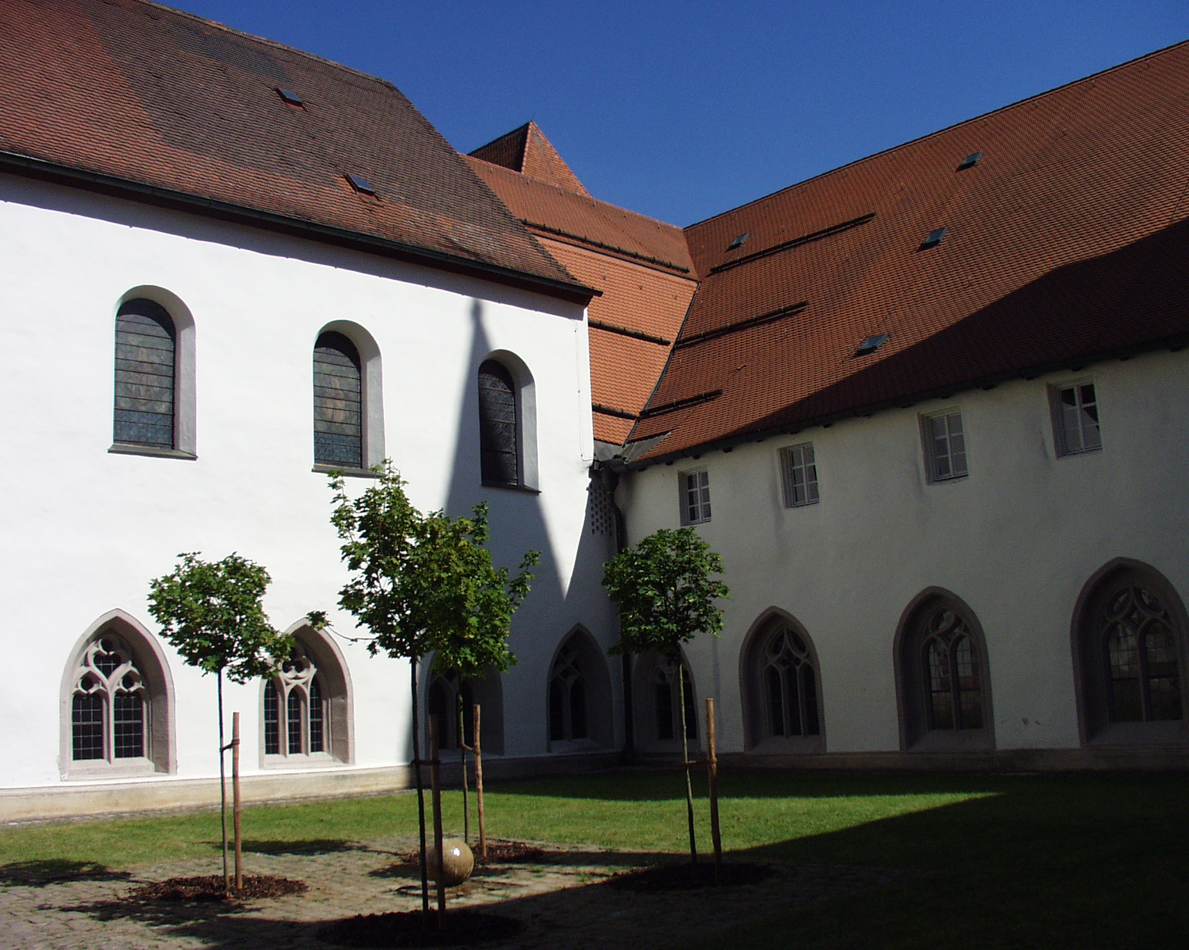 Kloster Heidenheim (Mittelfranken)